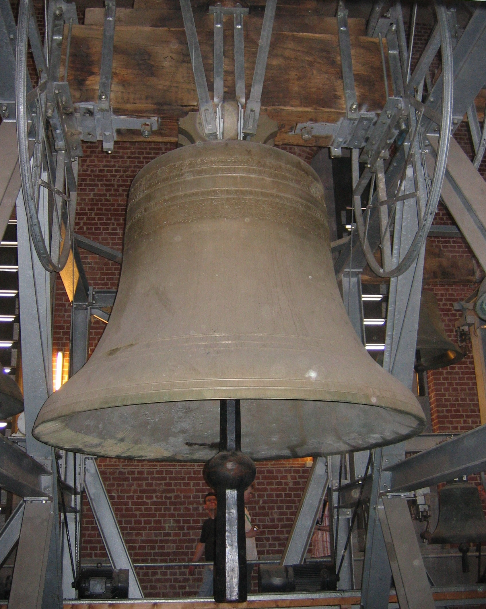 Köln, St. Kunibert, Bourdon oder Engelglocke von 1990.